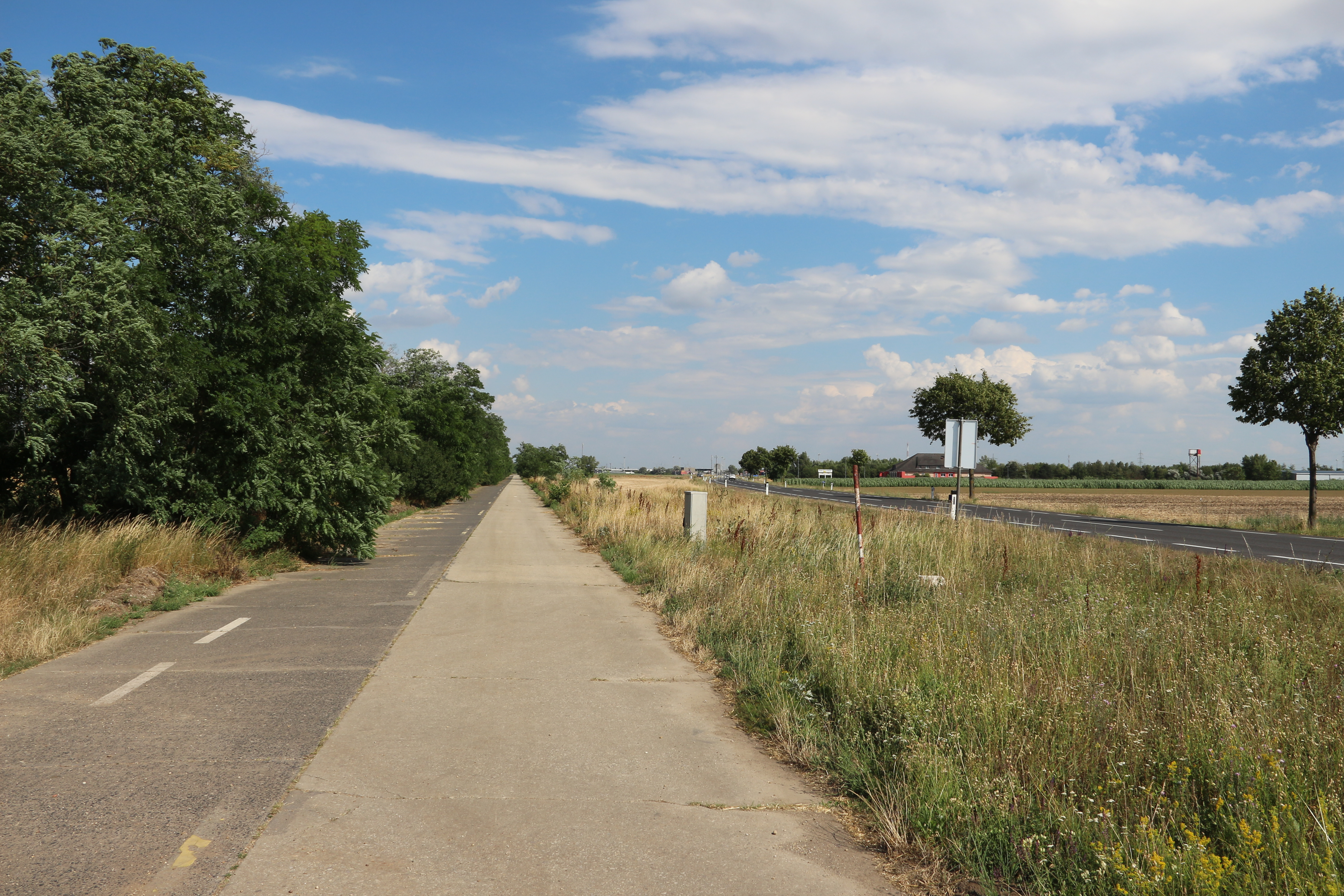 Die alte (links) und neue (rechts) Budapester Straße (B10) in Nickelsdorf an der Grenze zu Ungarn, Burgenland